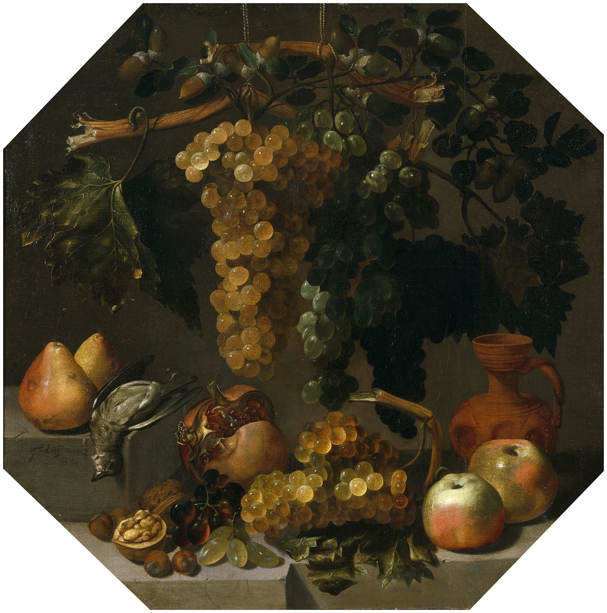 Bodegón ochavado con racimos de uvas.label QS:Les,"Bodegón ochavado con racimos de uvas."